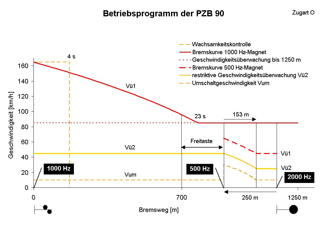 Betriebsprogramm der PZB 90, Zugart O